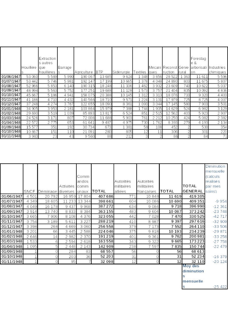 Source : Archives nationales contemporaines de Fontainebleau - Côte 770623/85, Tableau réalisés à partir des reports mensuels établis par le Ministère des forces armées, « Situation de la main-d’œuvre étrangère (Ministre des forcées armées) », Notes du 19/2/48, 17/3/48, 1/4/48, 25/11/48, 14/10/48, 25/9/47, 22/7/47. Précision importante, le tableau ne fait pas figurer les PG inactifs (ceux, entre autres, jugés inaptes stationnés en dépôt, ceux en transit vers un nouvel employeur, ceux en instance de libération ou de transformation de travailleur libre)